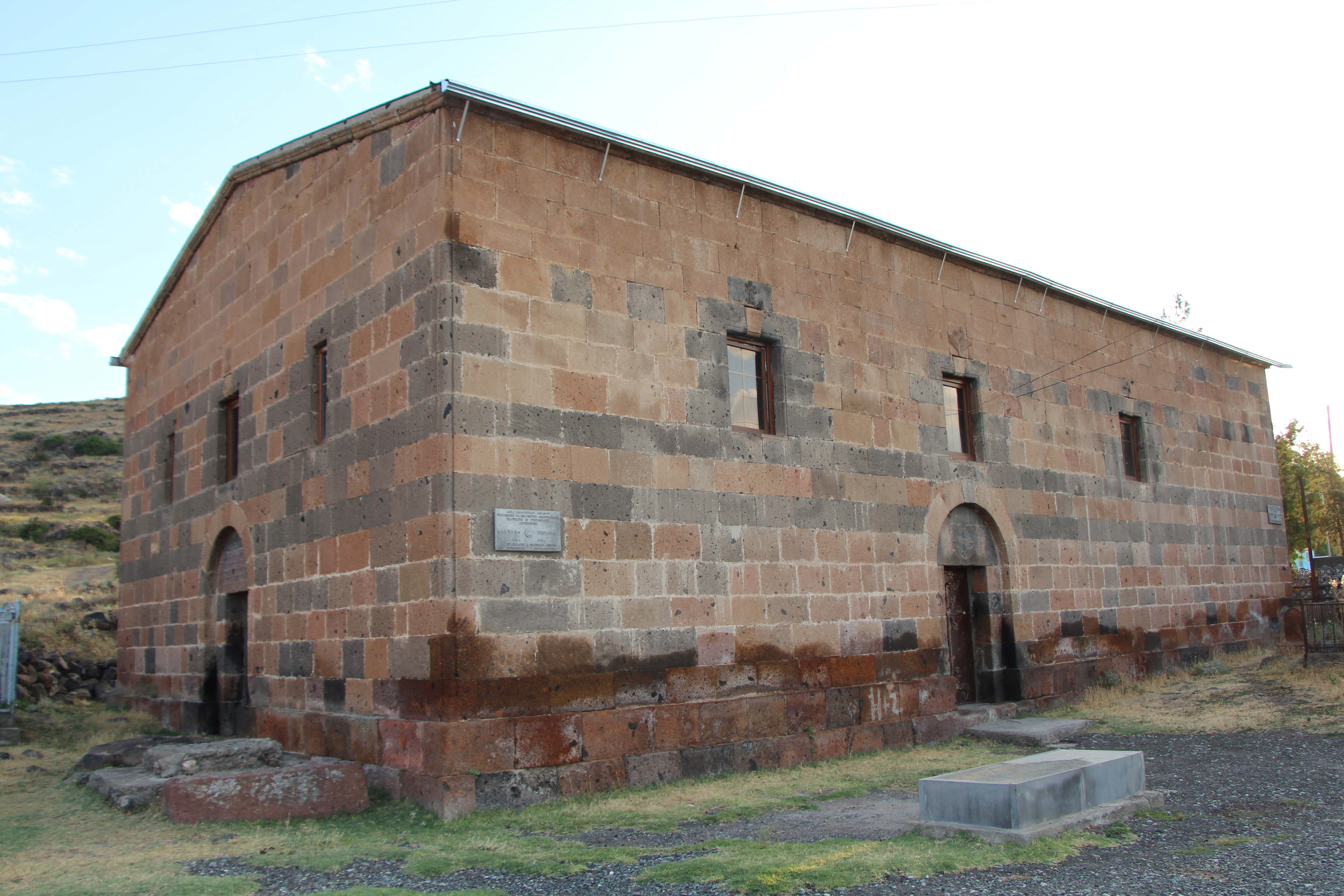 Կոշ, Արագածոտնի մարզ, եկեղեցի Ս. Գևորգ 1891 թ. 61/10.1